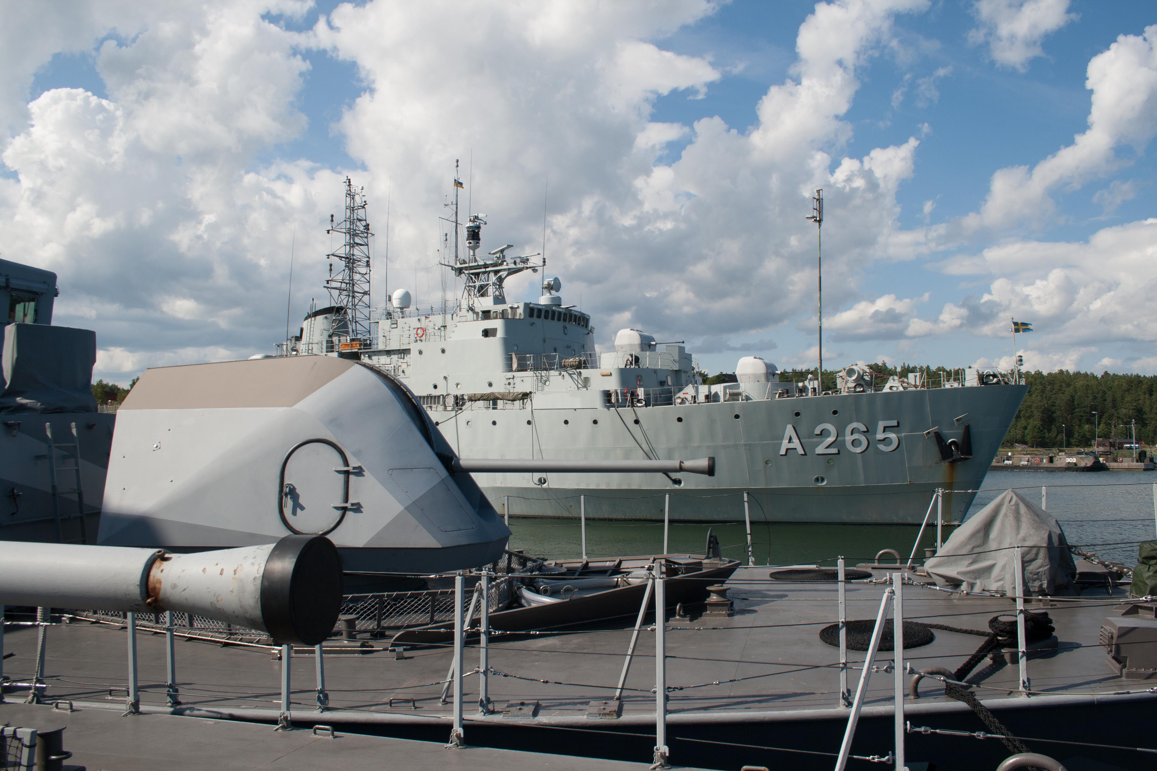 Ships at Berga navy base